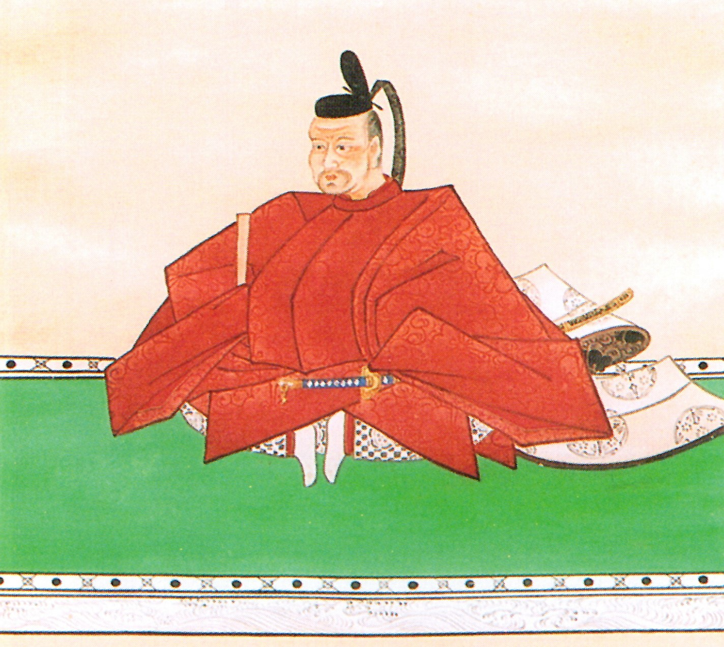 岡田善政の肖像。